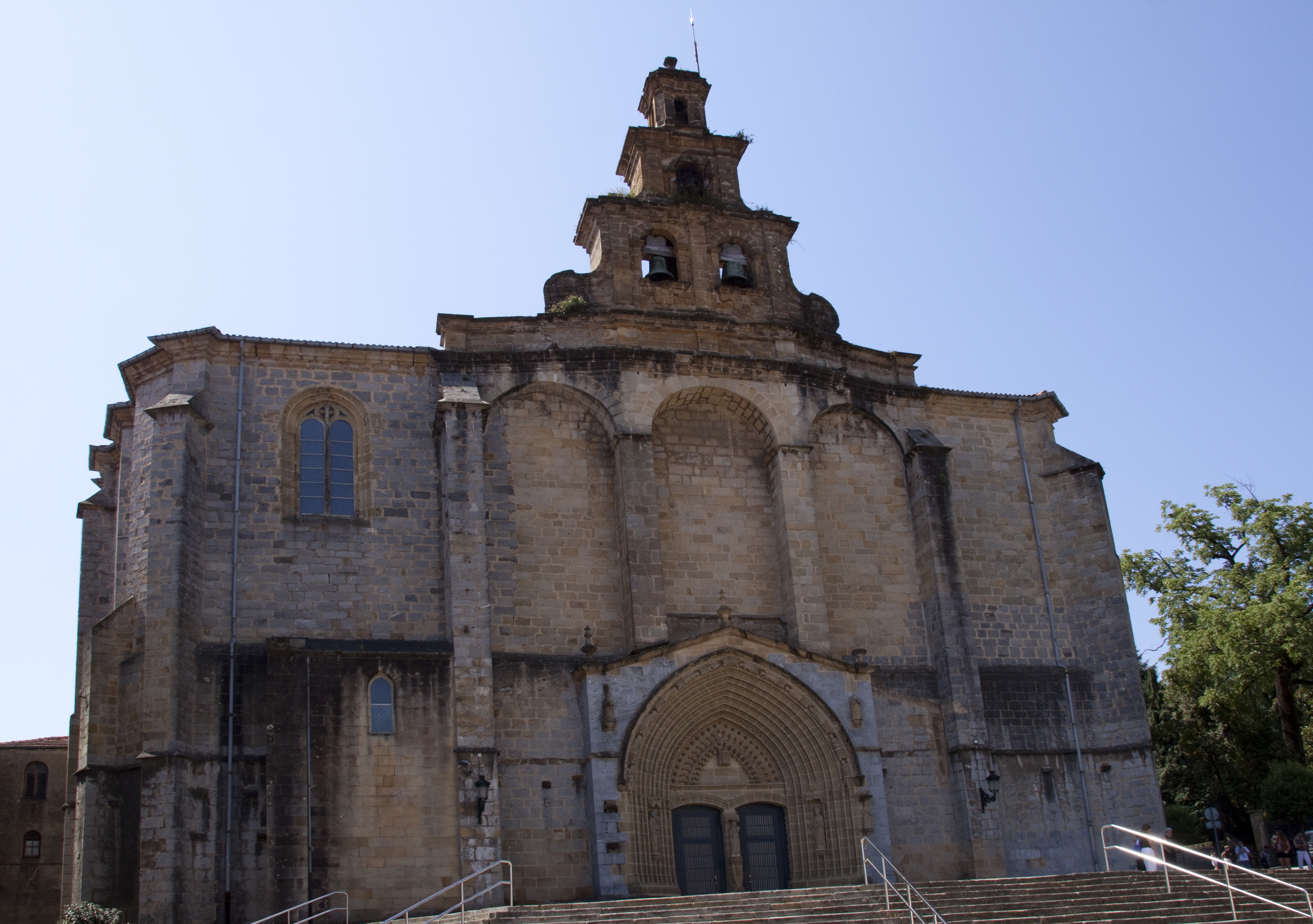 Iglesia de Santa María de Guernica (Vizcaya).